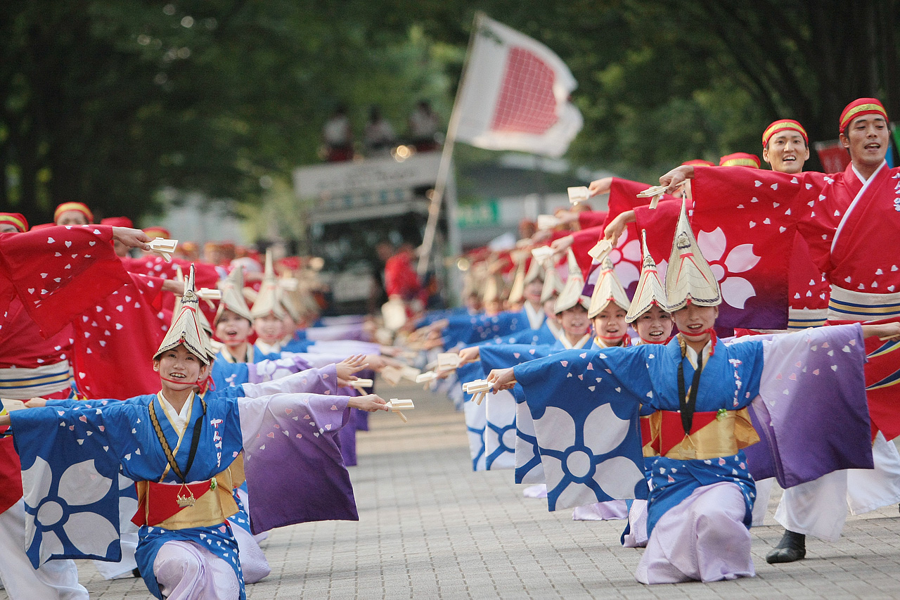 原宿スーパーよさこい2007